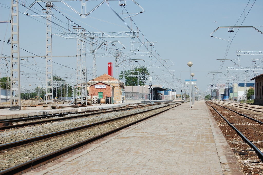 Estación de Casetas. Vista general de la estación. A la izquierda se puede ver el antiguo edificio y más al fondo el nuevo.